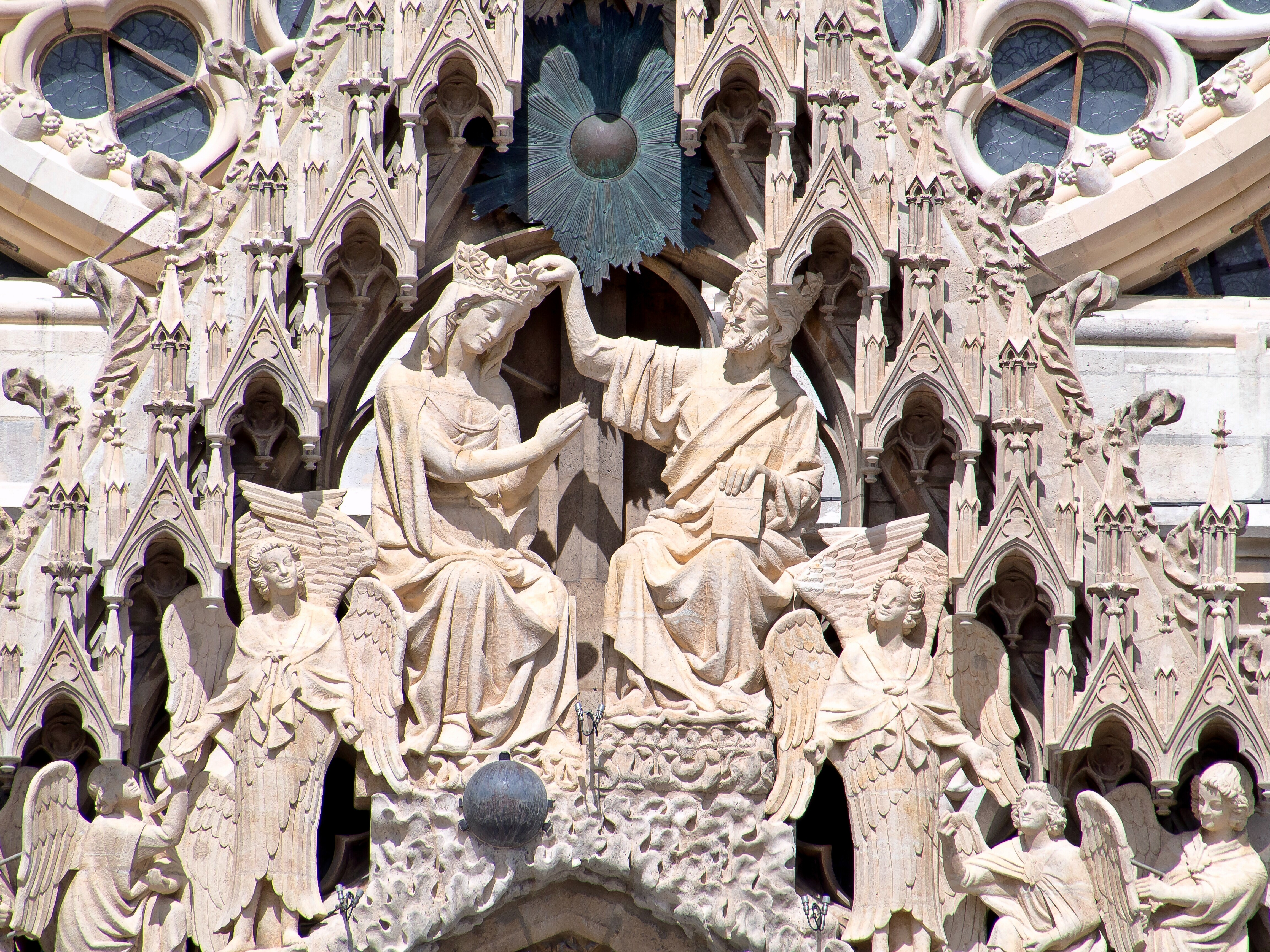 Reims, Kathedrale, Marienkrönung